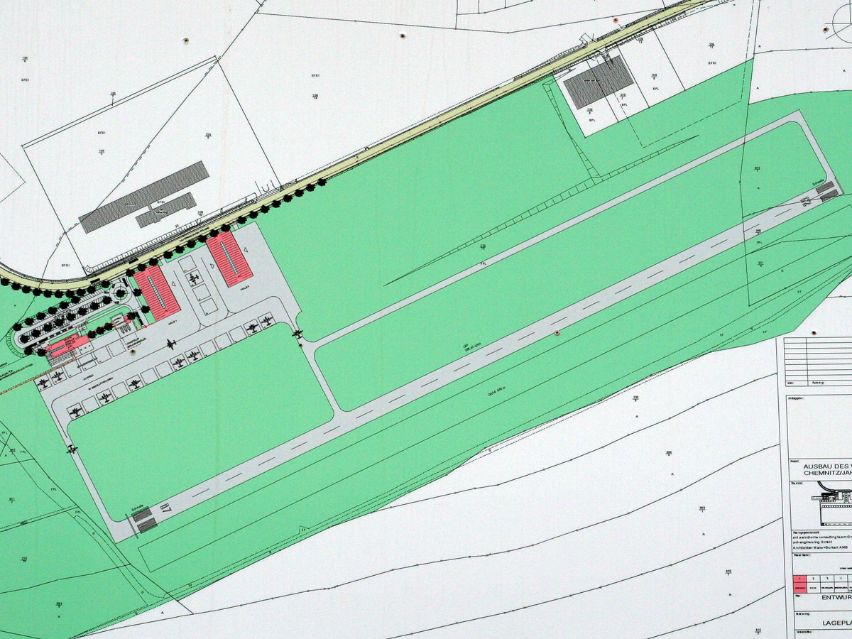 Bautafel am Flugplatz Chemnitz-Jahnsdorf. Sie zeigt, wie der Flugplatz zukünfitg aussehen wird